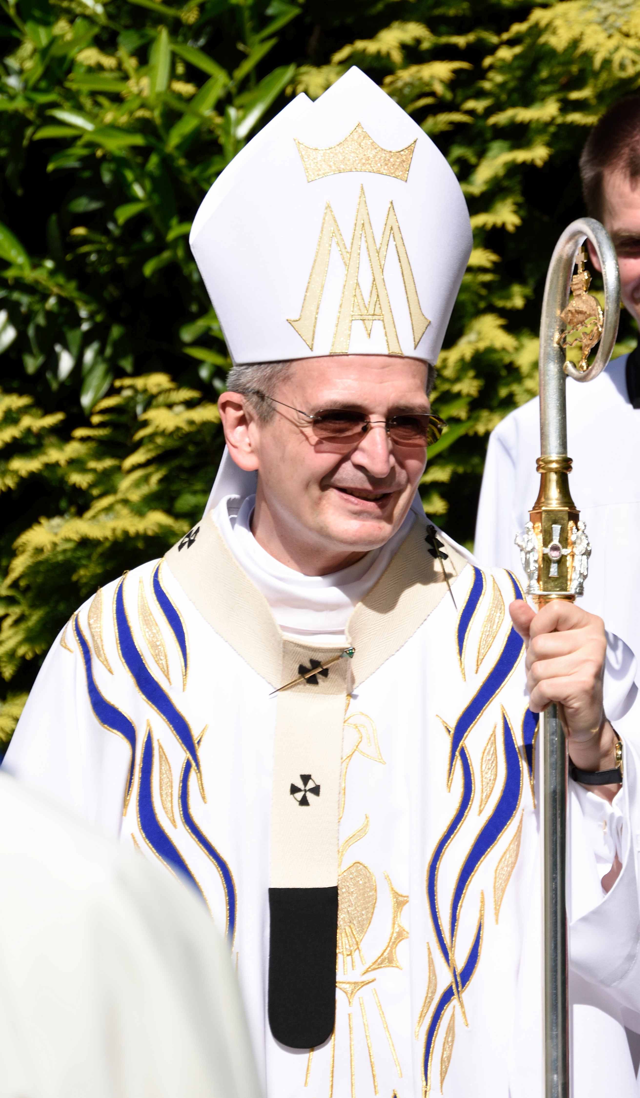 Arcibiskup Stanislav Zvolenský, Marianka, máj 2016